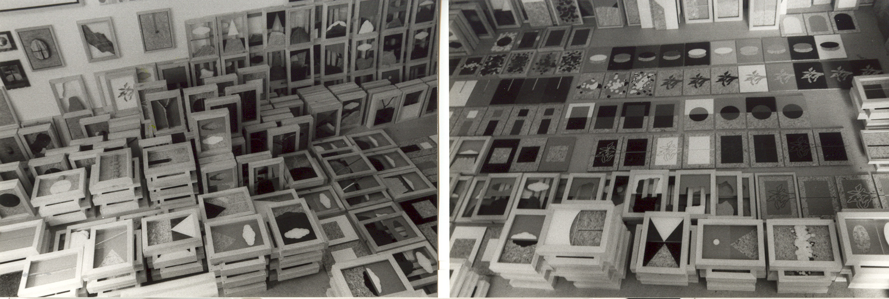 Artist :Gianfredo Camesi Title : «Alchimie de la Vision - Archéologie de la Pensée» 1985.